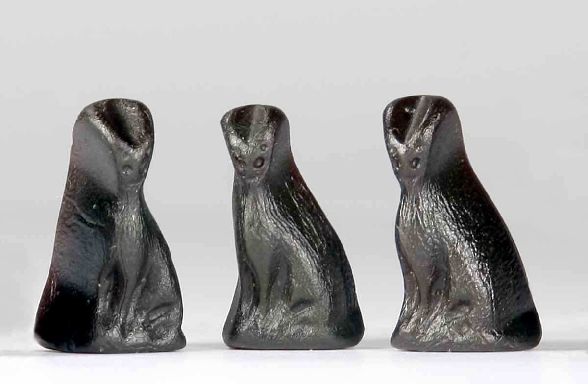 3 Katjes-Kinder aus Lakritz des Herstellers Katjes Fassin GmbH + Co. KG, Emmerich am Rhein